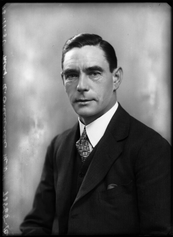 Arcibald Cruc